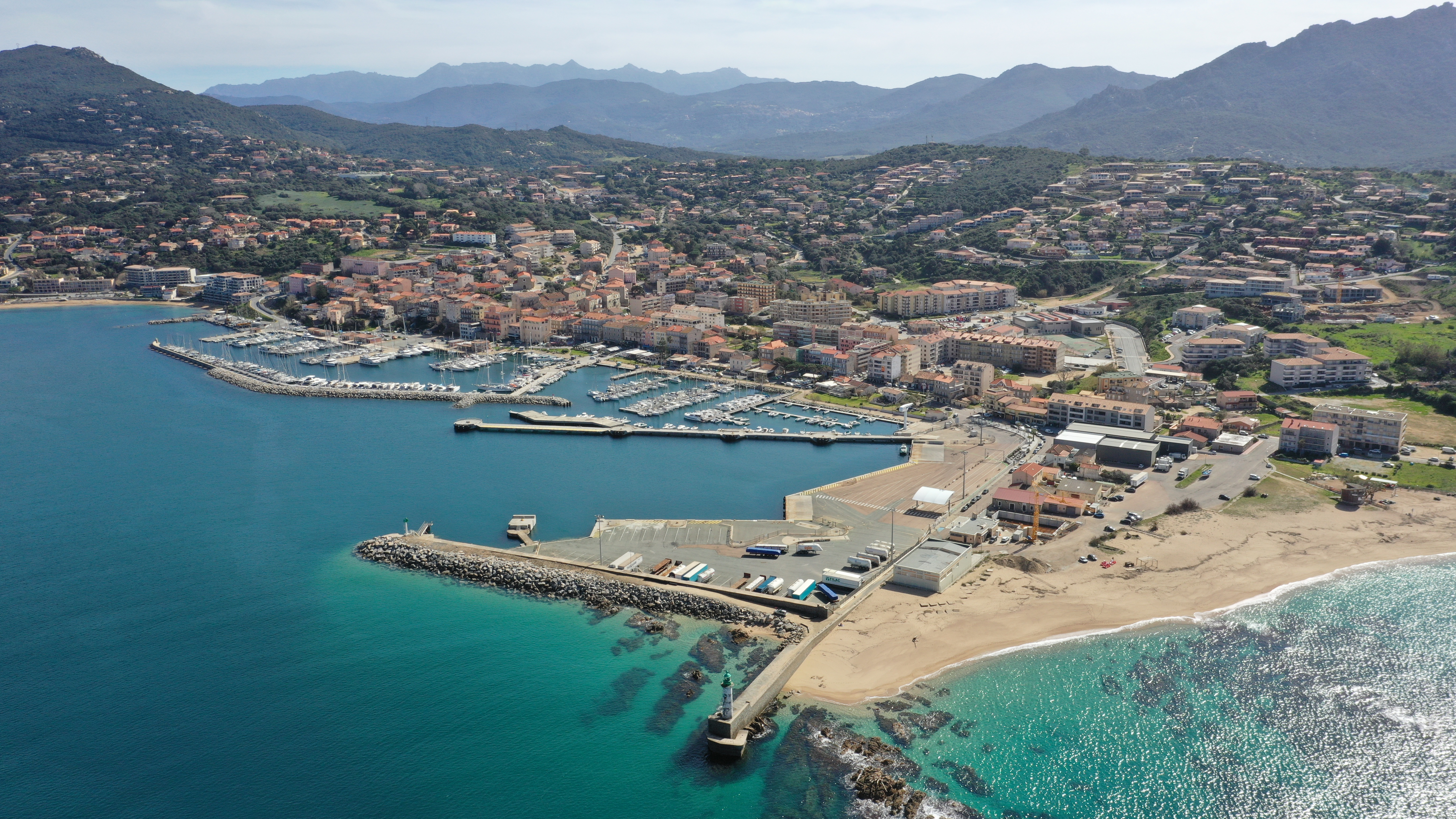 Propriano vu d'un drone auto entrepreneur Valinco Drone